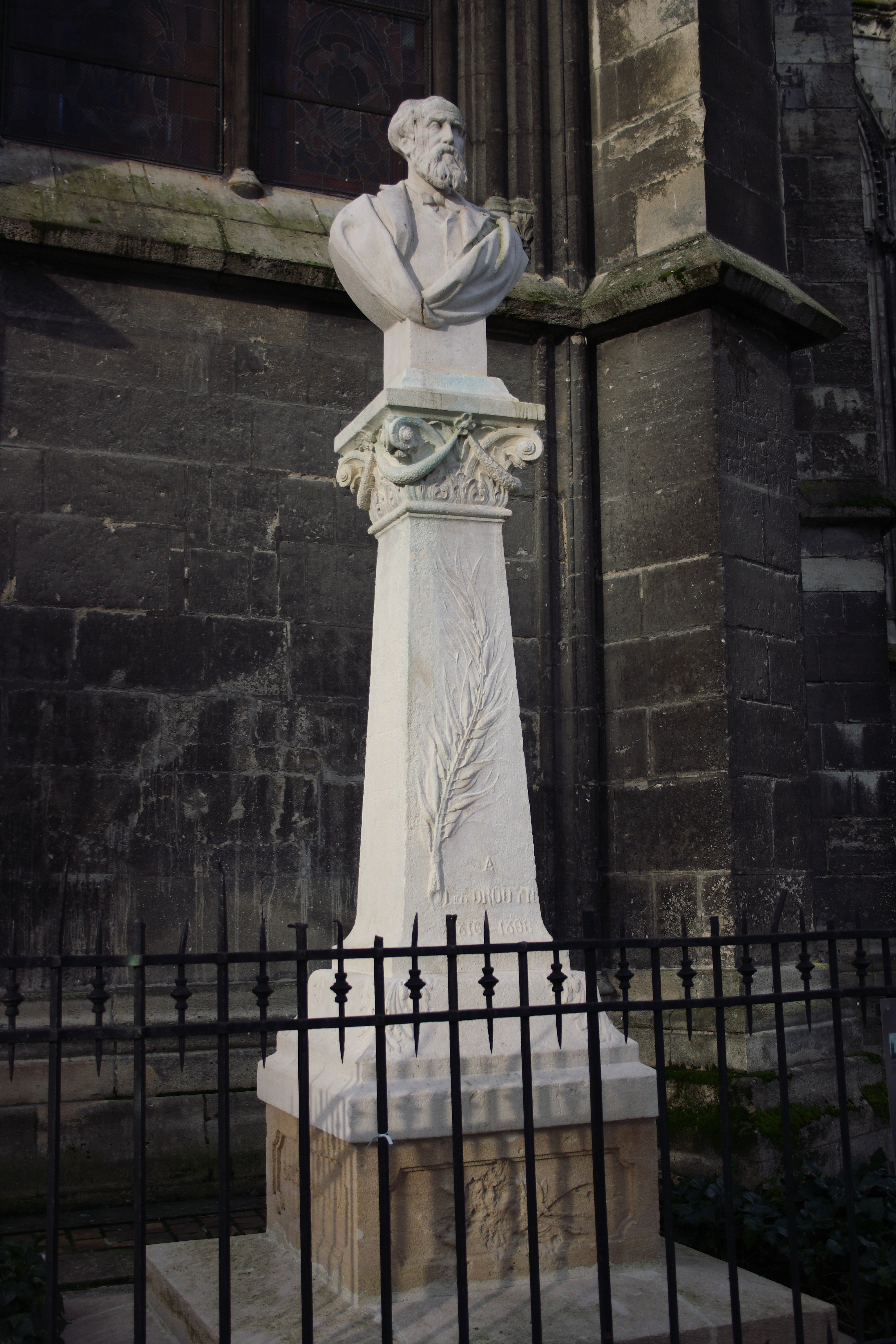 Skulptur von Léo Drouyn (1816-1896) bei der Kathedrale Saint-André in Bordeaux (Region Aquitanien, Frankreich)